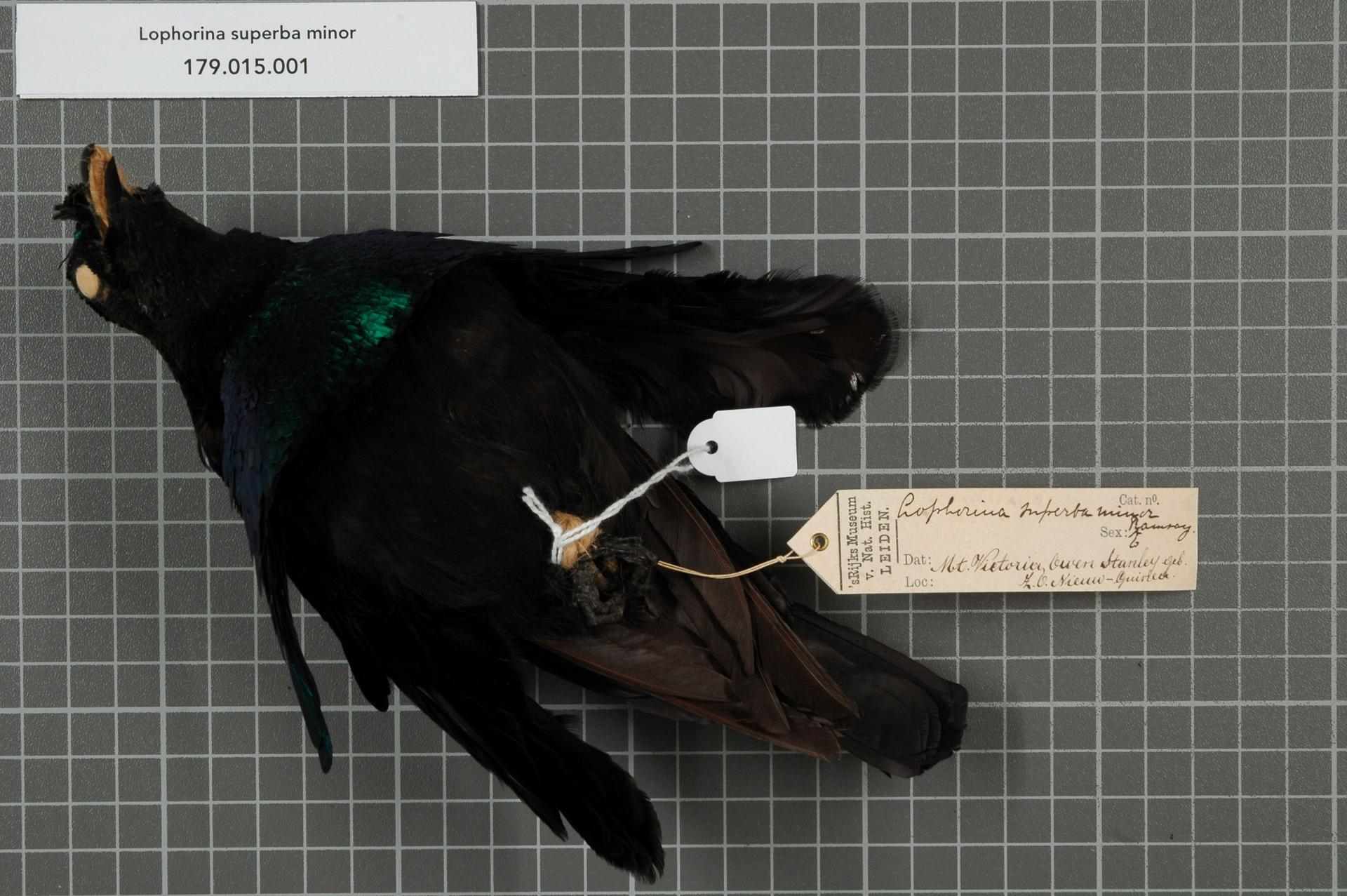 Lophorina superba minor Ramsay, 1885